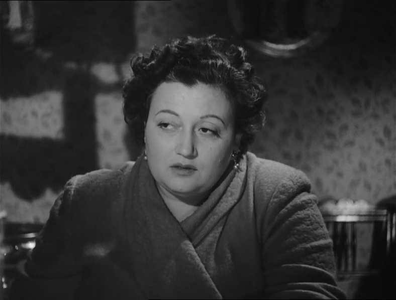 Scena dal film Il viale della speranza